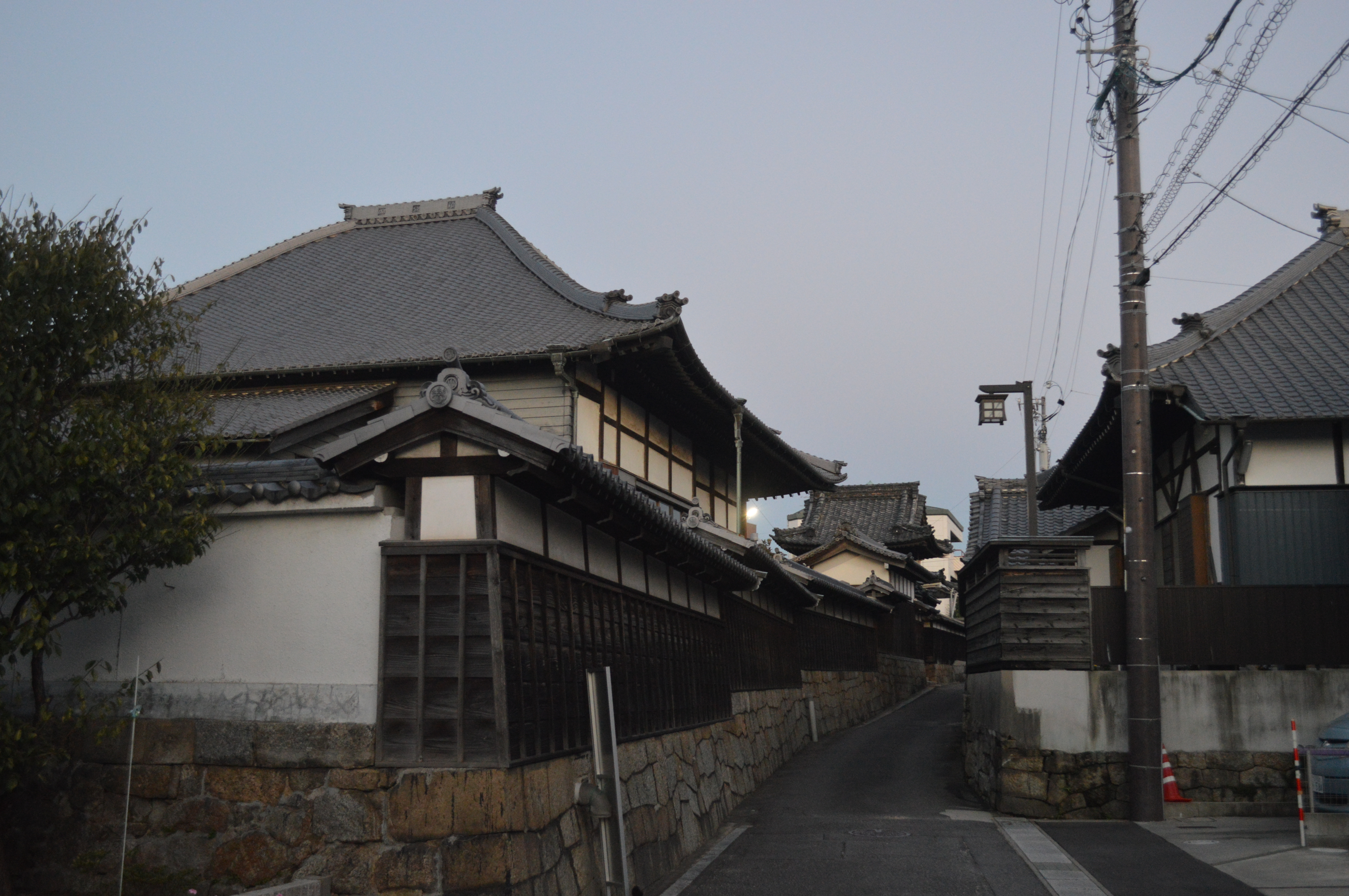 順海町通り。愛知県西尾市。左は唯法寺、右は崇覚寺。